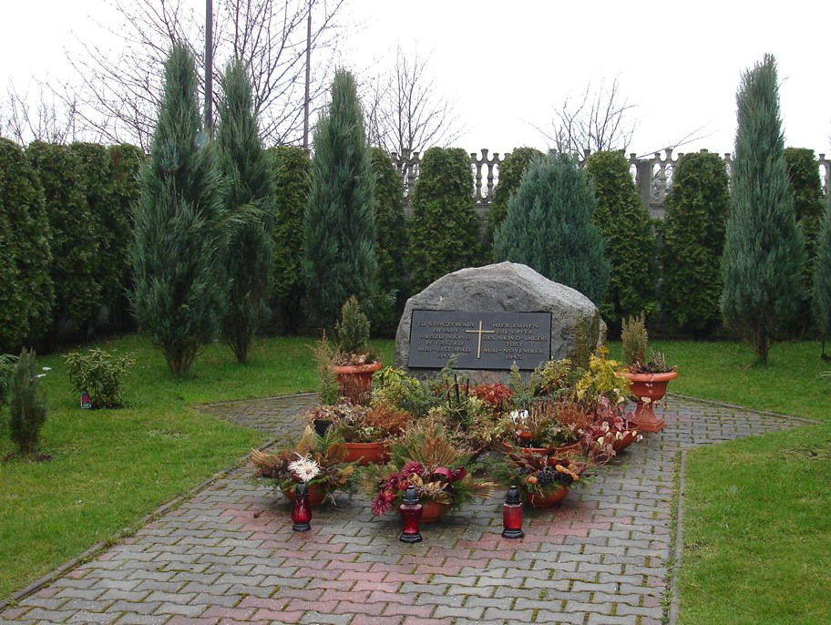 Massengrab der Opfer des NKWD Lagers Toszek Inschrift: Hier ruhen mehr als 3000 Opfer des Internierungslagers des NKWD aus dem Jahre 1945. Am 46. Jahrestag der Auflösung des Lagers Toszek XI 25 1991.